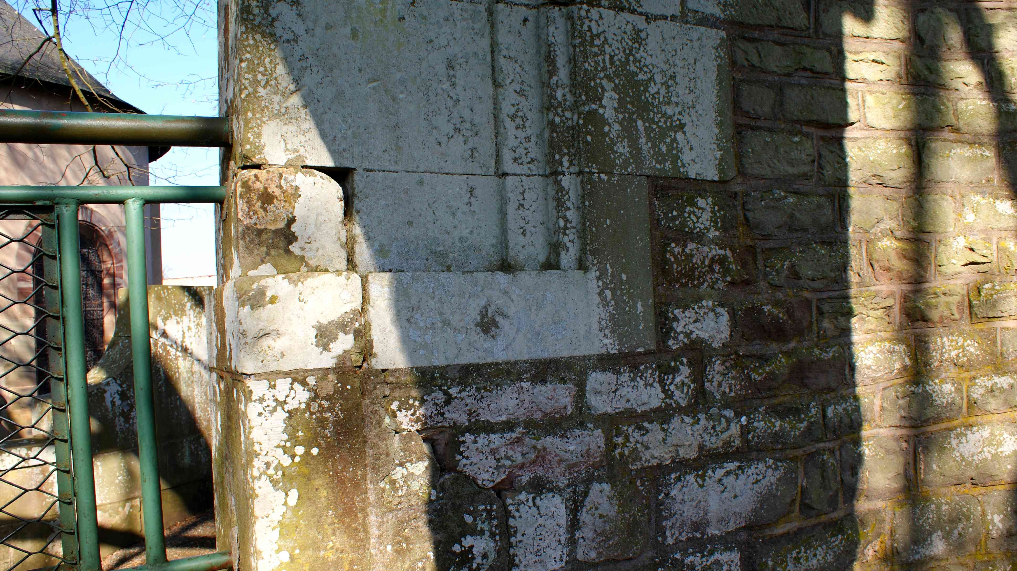 Particularité non loin de l'église, une ancienne croix gammée sous la mousse.